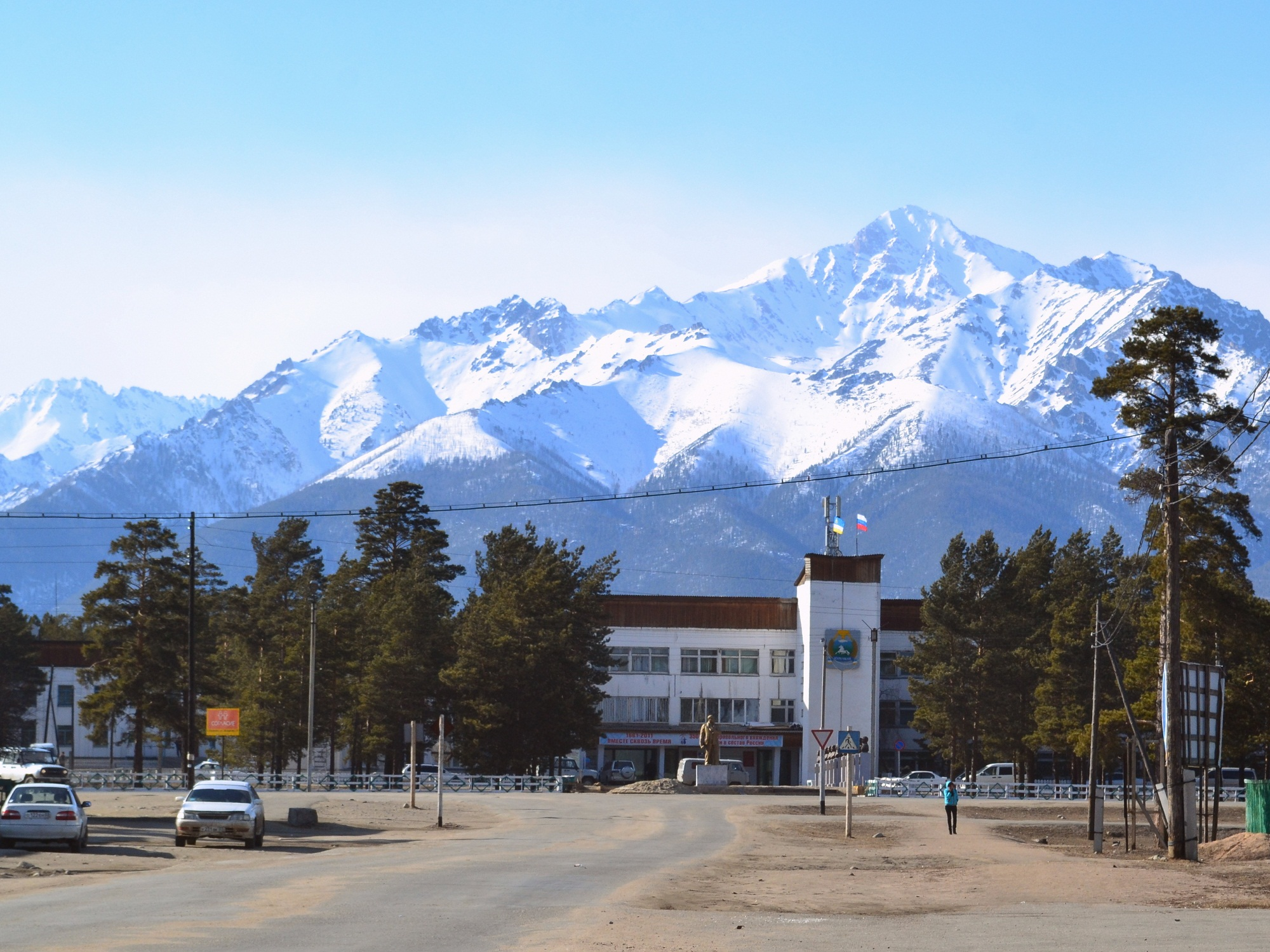 Вид на здание администрации Курумканского района. Село Курумкан, Бурятия